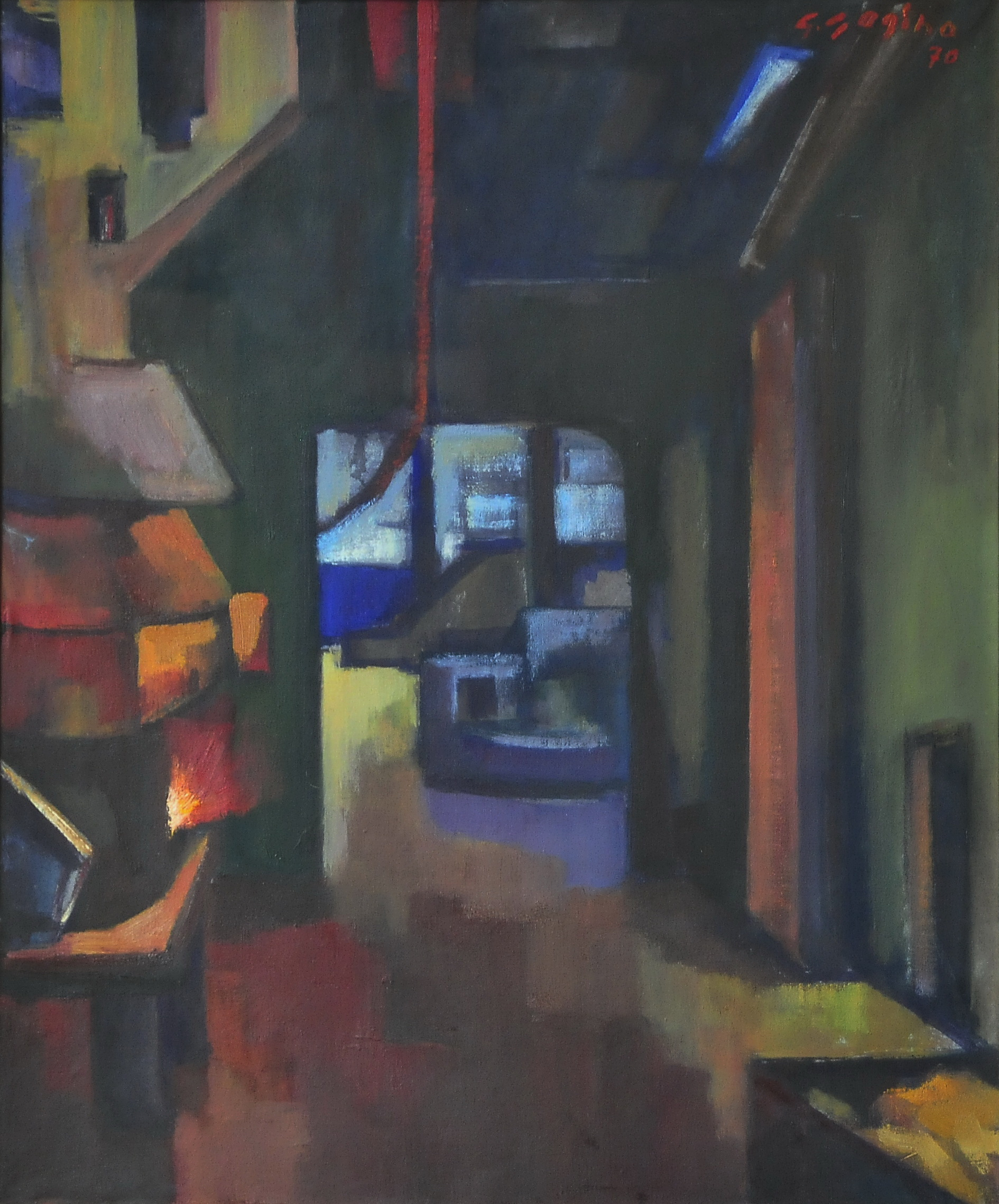 Giovanni Gagino, Fonderia (1970, olio su tela cm 50x60)